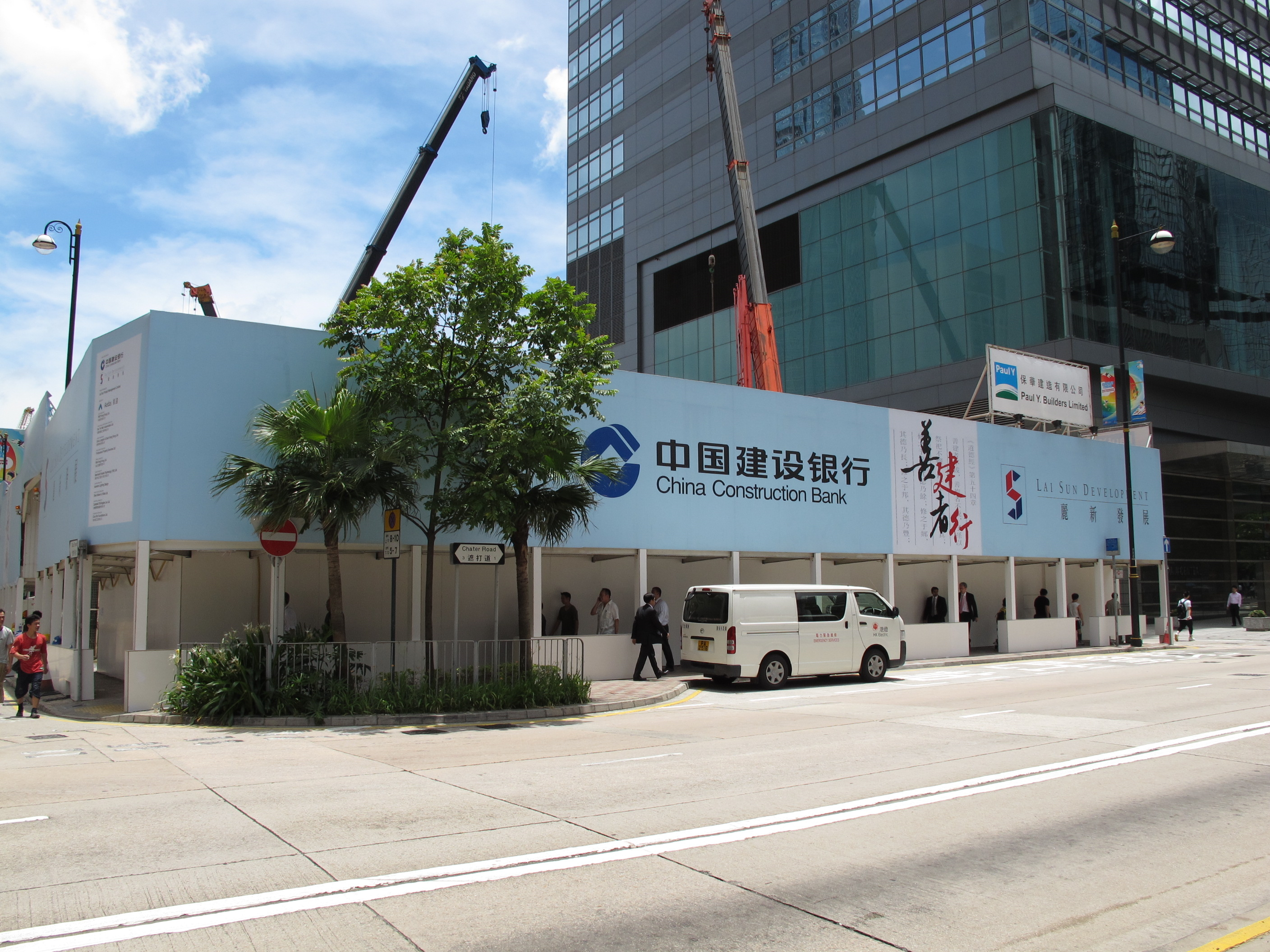 CCB Tower Site